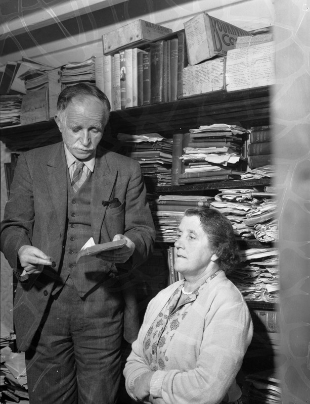 Teitl Cymraeg/Welsh title:Bob Owen, Croesor, gyda'i wraig ac ychydig o'i lyfrau Ffotograffydd/Photographer: Geoff Charles (1909-2002) Dyddiad/Date: December 25, 1958 Cyfrwng/Medium: Negydd ffilm / Film negative Cyfeiriad/Reference: (gch19593) Rhif cofnod / Record no.: 3470068 Rhagor o wybodaeth am gasgliad Geoff Charles yn Llyfrgell Genedlaethol Cymru More information about the Geoff Charles Collection at the National Library of Wales Mae ffotograffau Geoff Charles hefyd yn rhan o Broject Europeana Libraries Geoff Charles' photographs also form part of the Europeana Libraries Project